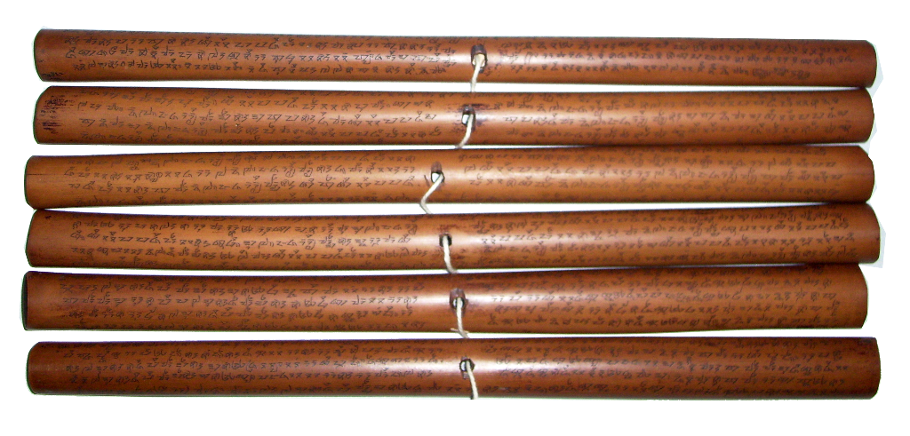 Sunda: Naskah Sunda kuna dina awi